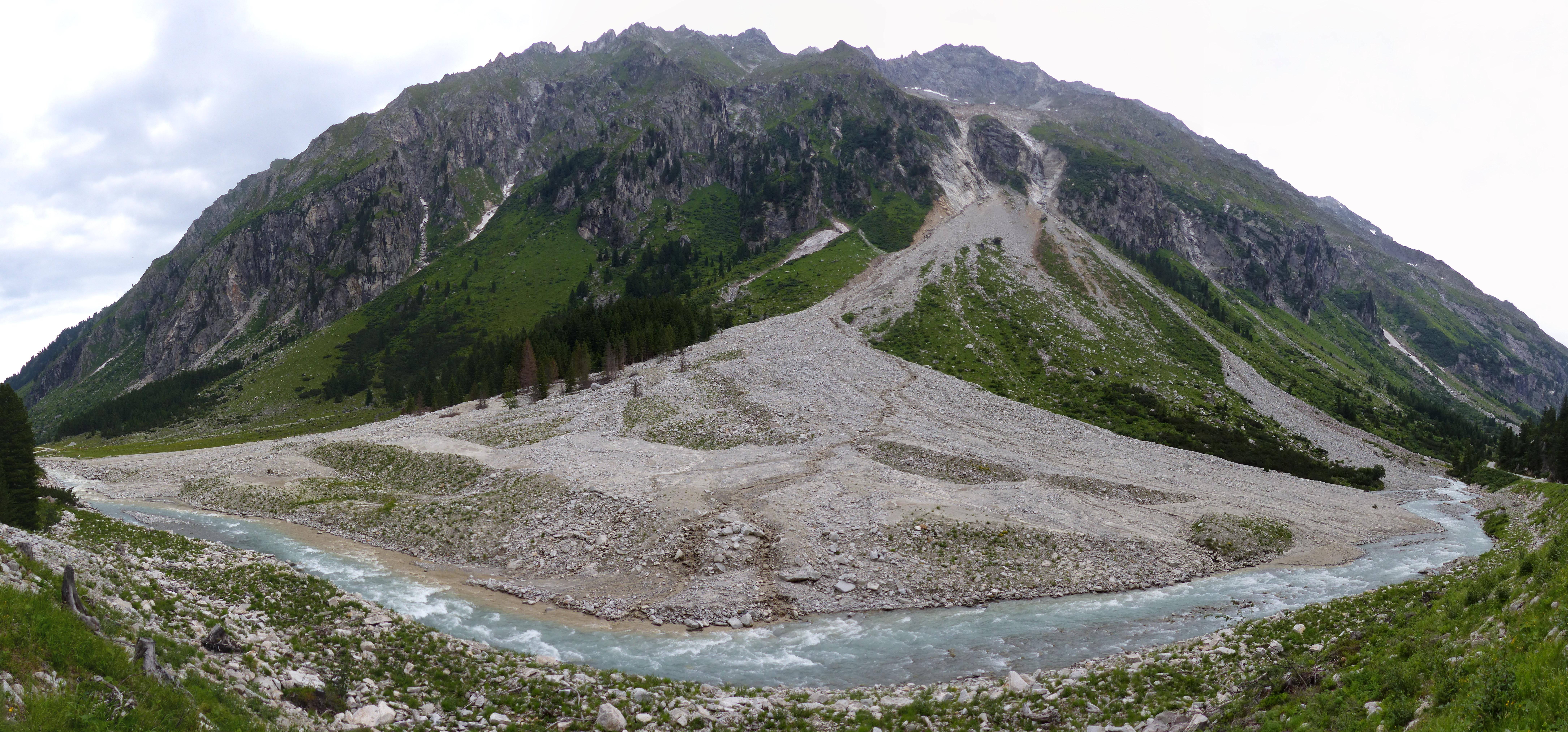 Zu Tal gegangenes Geschiebe aus dem Sattelkar im Obersulzbachtal. Das Bild ist aus 4 Teilbildern zusammengesetzt.